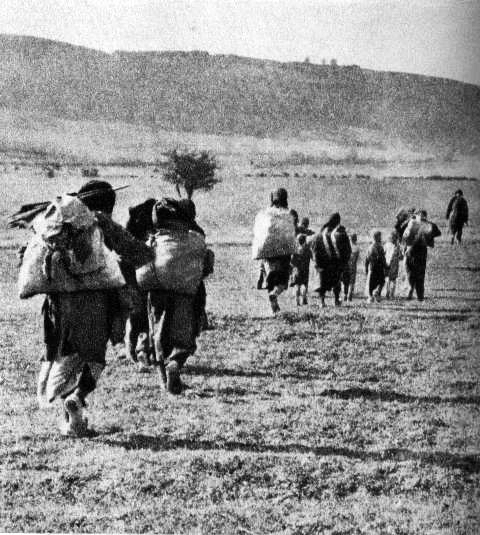 Narod sa Banije se povlači, IV ofenziva ("Operation Weiss" January-March 1943)